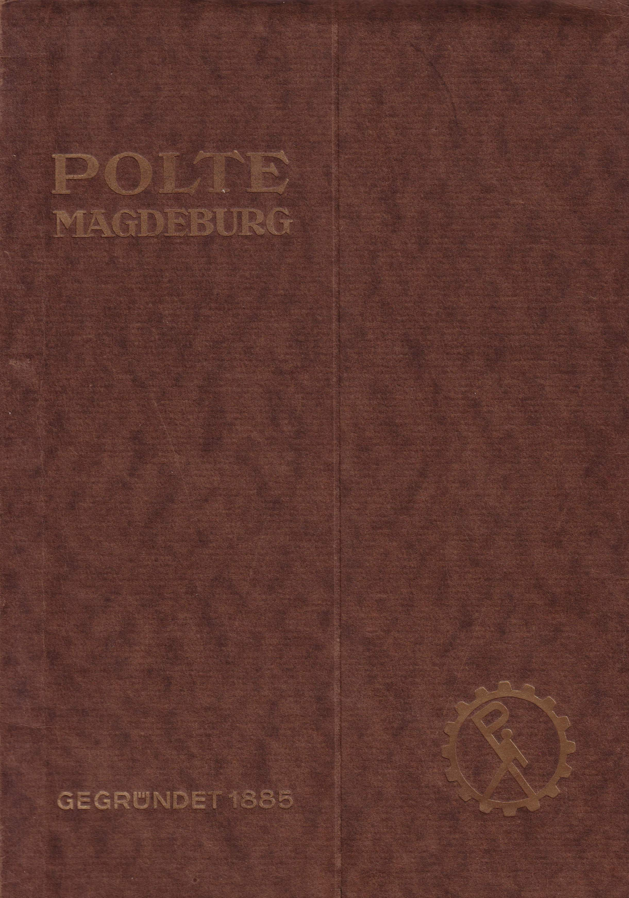 Katalog/Produktverzeichnis und Preisliste (Armaturen) der Polte-Werke